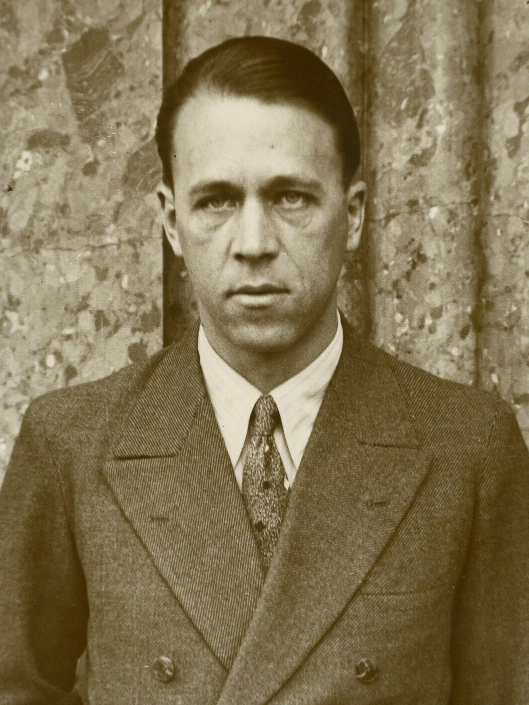 "ROSETTA Capitaine Equipe d'Italie 1932" Photo originale G. DEVRED / Agce ROL